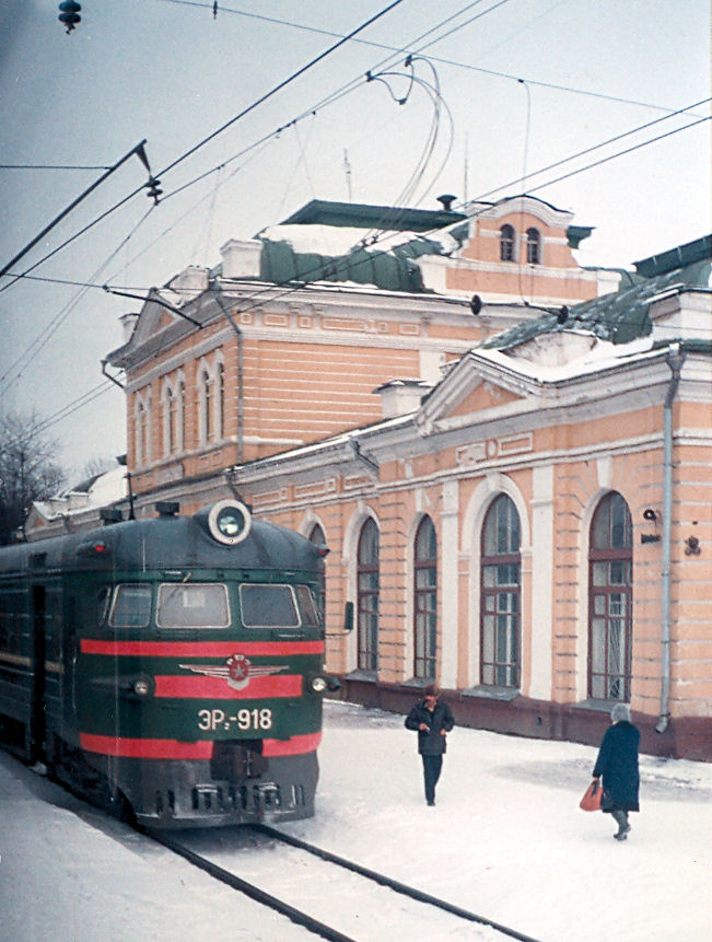 112km from Moscow.